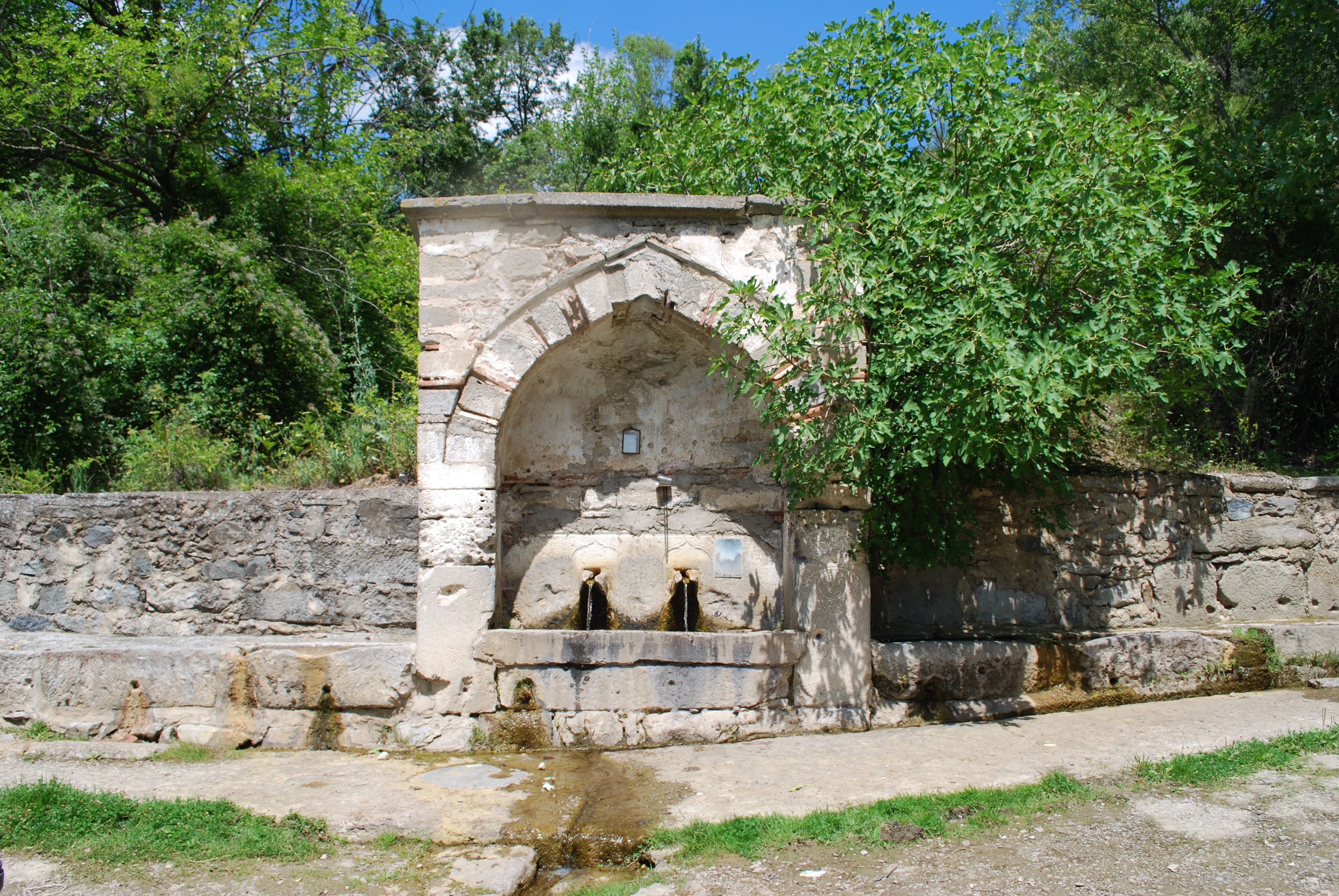 Старата византиска чешма во Винцe, кумановско, Македонија